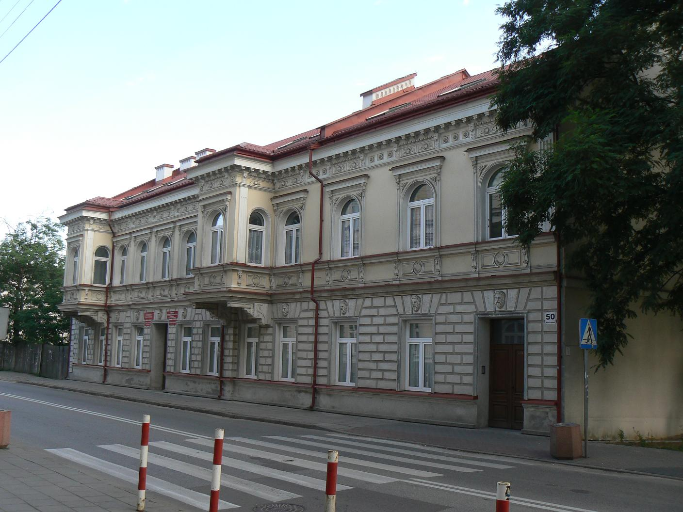 Białystok, ul. Warszawska 50 - dom, k. XIX w., obecnie Katedra Teologii Katolickiej UwB (zabytek nr A-159 z 30.12.1975)